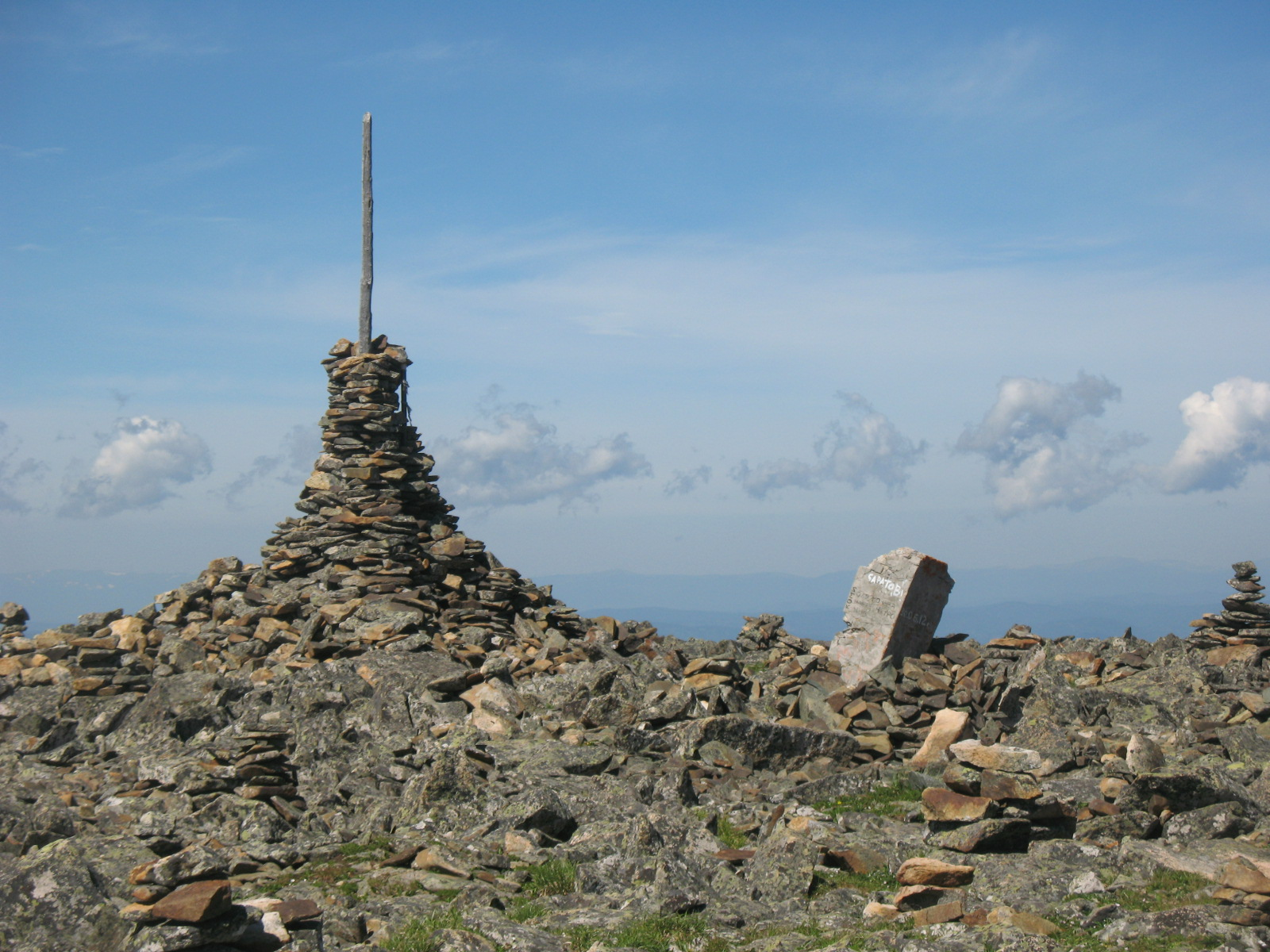 Каменная пирамида на вершине г. Сарлык